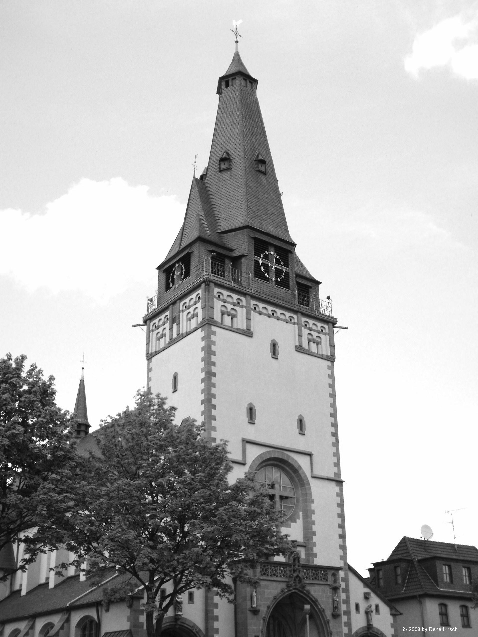 kath. Pfarrkirche St.Joseph in Leverkusen-Manfort